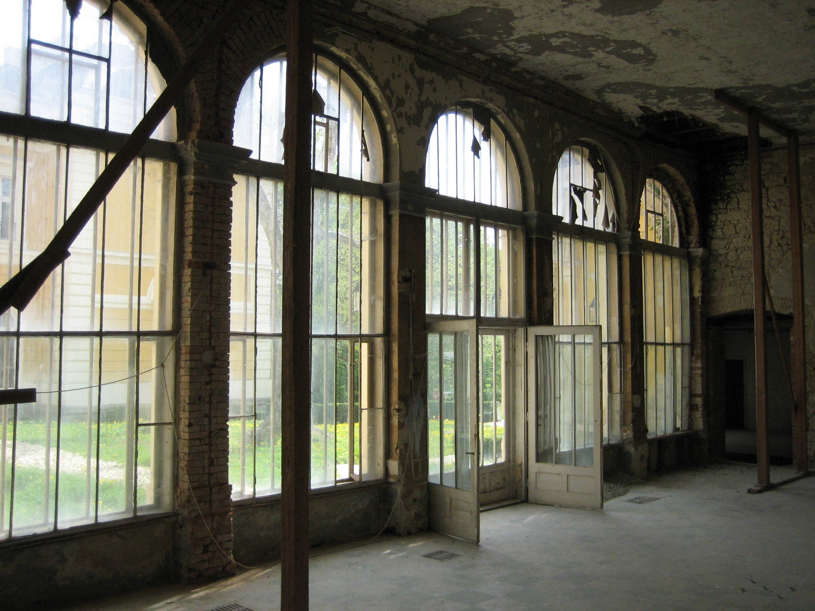 A füzérradványi Károlyi-kastély narancsháza belülről This is a photo of a monument in Hungary. Identifier: 2768